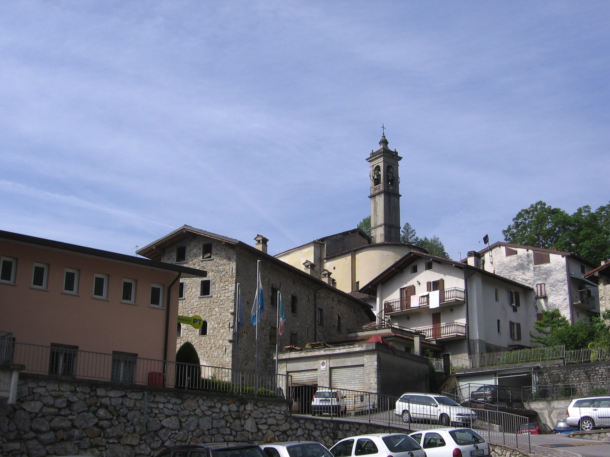 Bracca, Bergamo, Italia